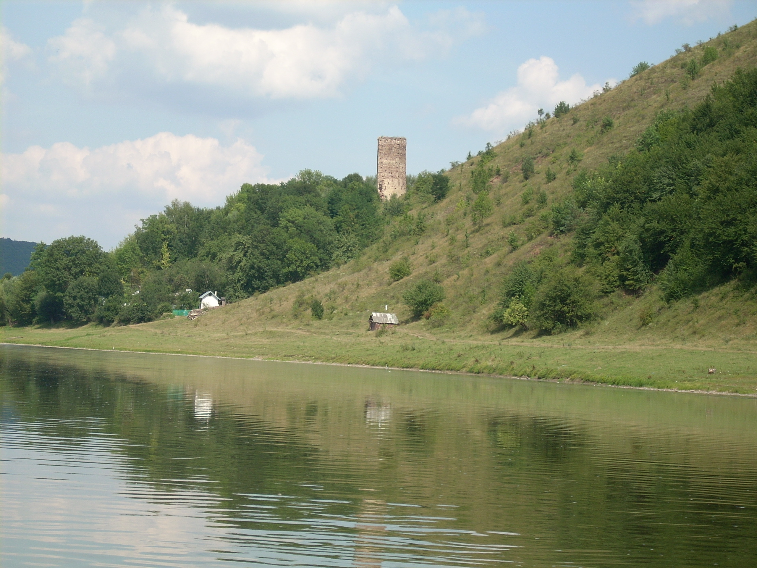 Руїни замку Беньовського, 1660 рік, с. Раковець, Городенківський район